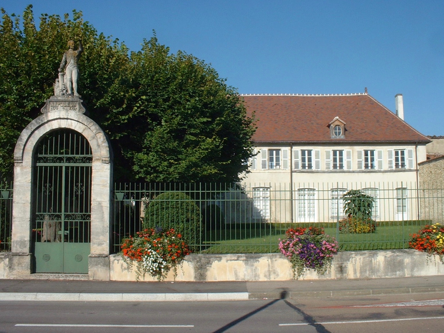 l'ancienne école militaire de Brienne le Château aujourd'hui reconvertie en musée